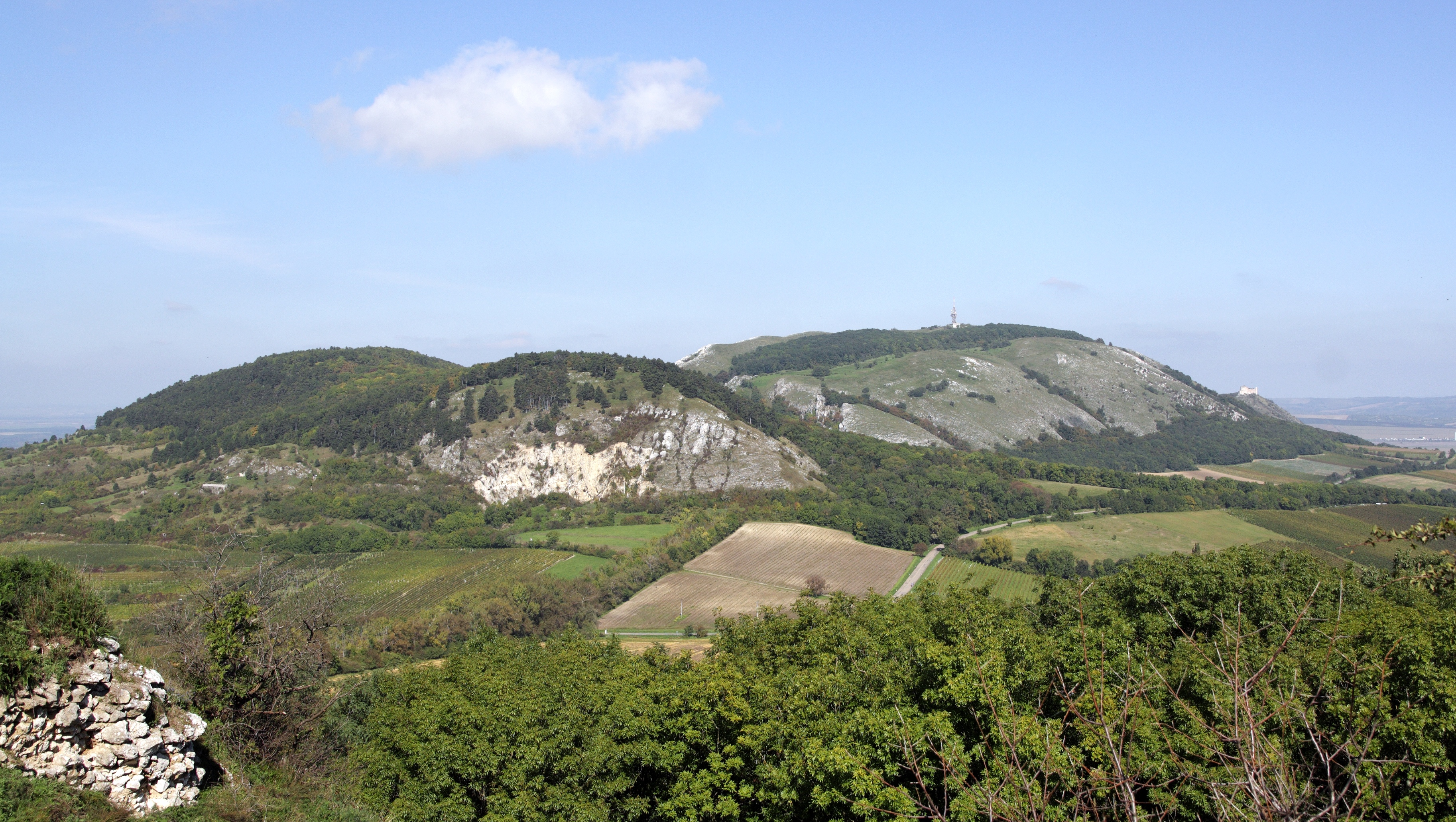 Děvín a Kotel, pohled ze Stolové hory.